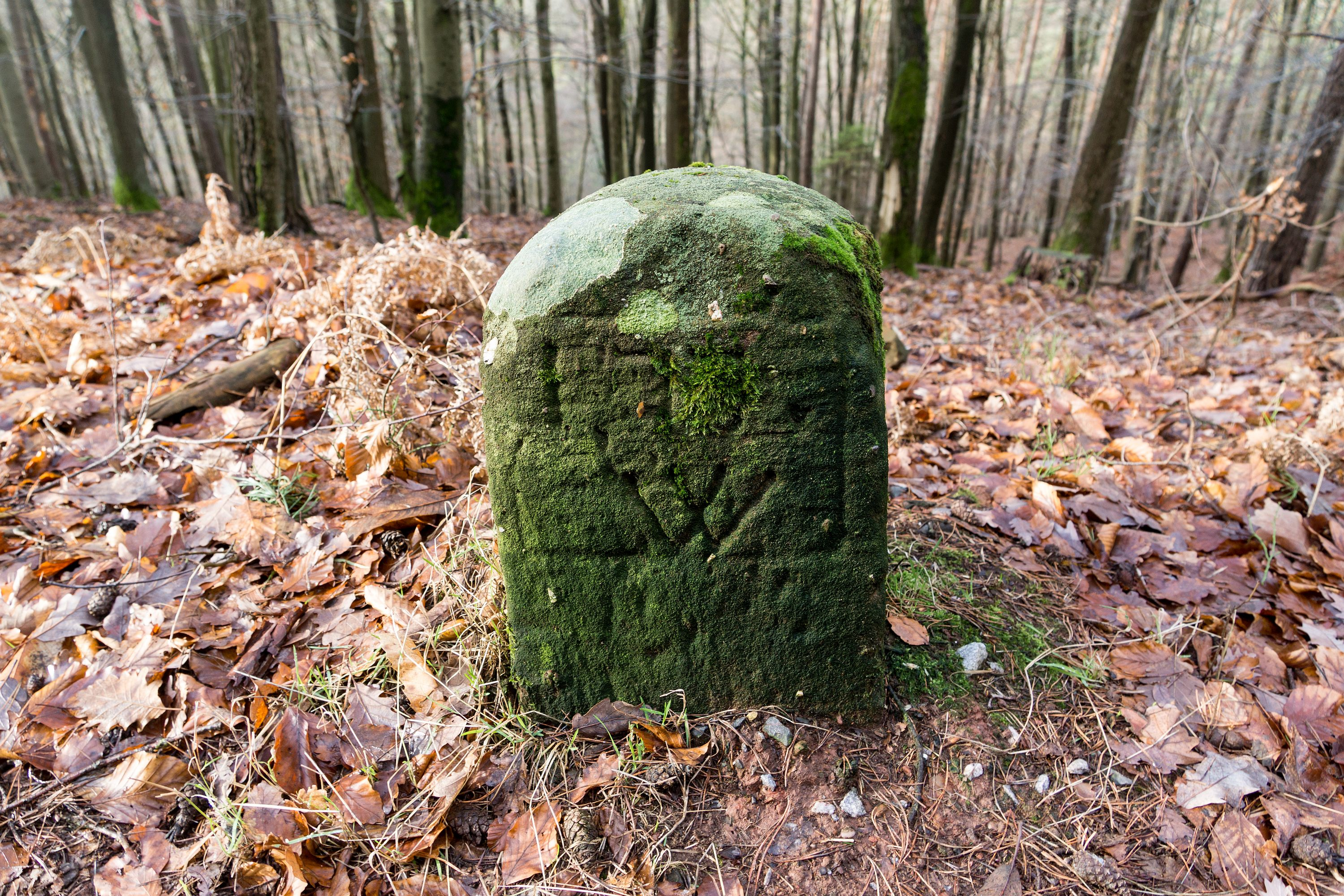 Grenzstein Wollmesheimer Wald (Unterheidäckerweg)